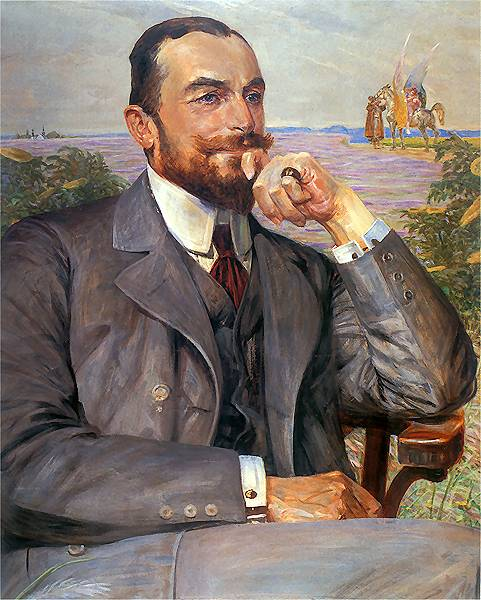 Jacek Malczewski (1854-1929) – polski malarz symbolista. Ludwik Żeleński